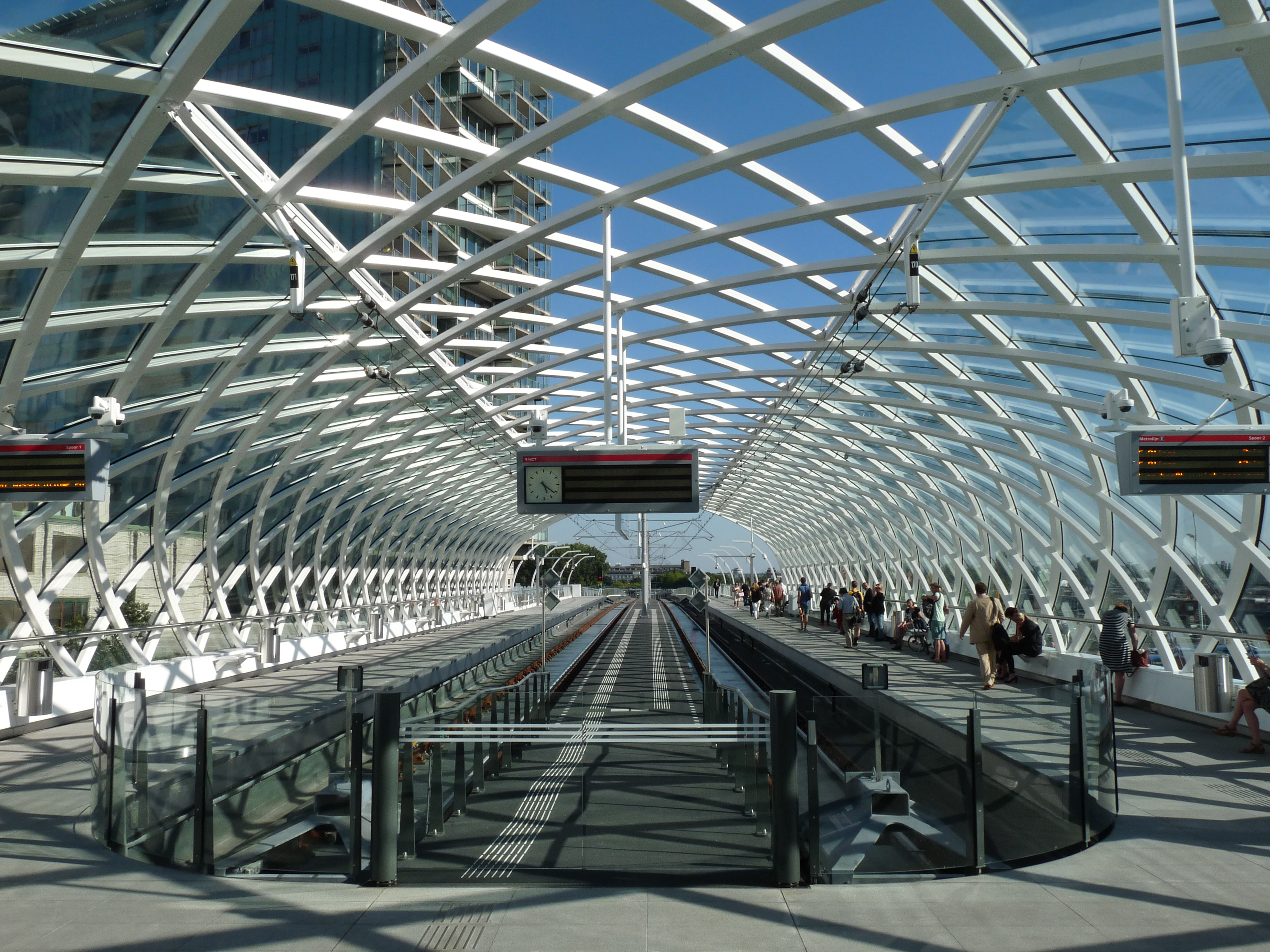 Het nieuwe metrostation van Den Haag Centraal. Het middenperron kan gebruikt worden bij een noodexploitatie waarbij Randstadrail trams hier stoppen.